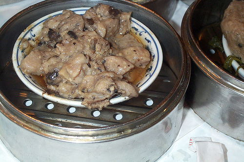 Dim sum pai gui spare rib sparerib spareribs